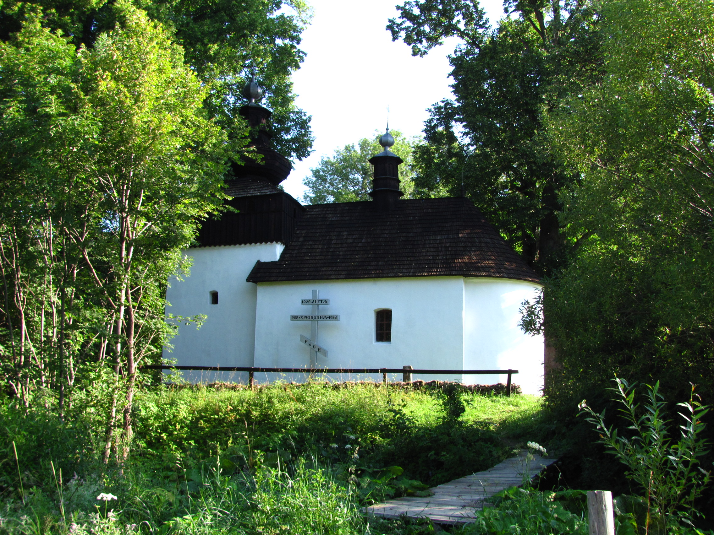 Bieliczna - zespół cerkwi greckokatolickiej pw. św. Michała Archanioła